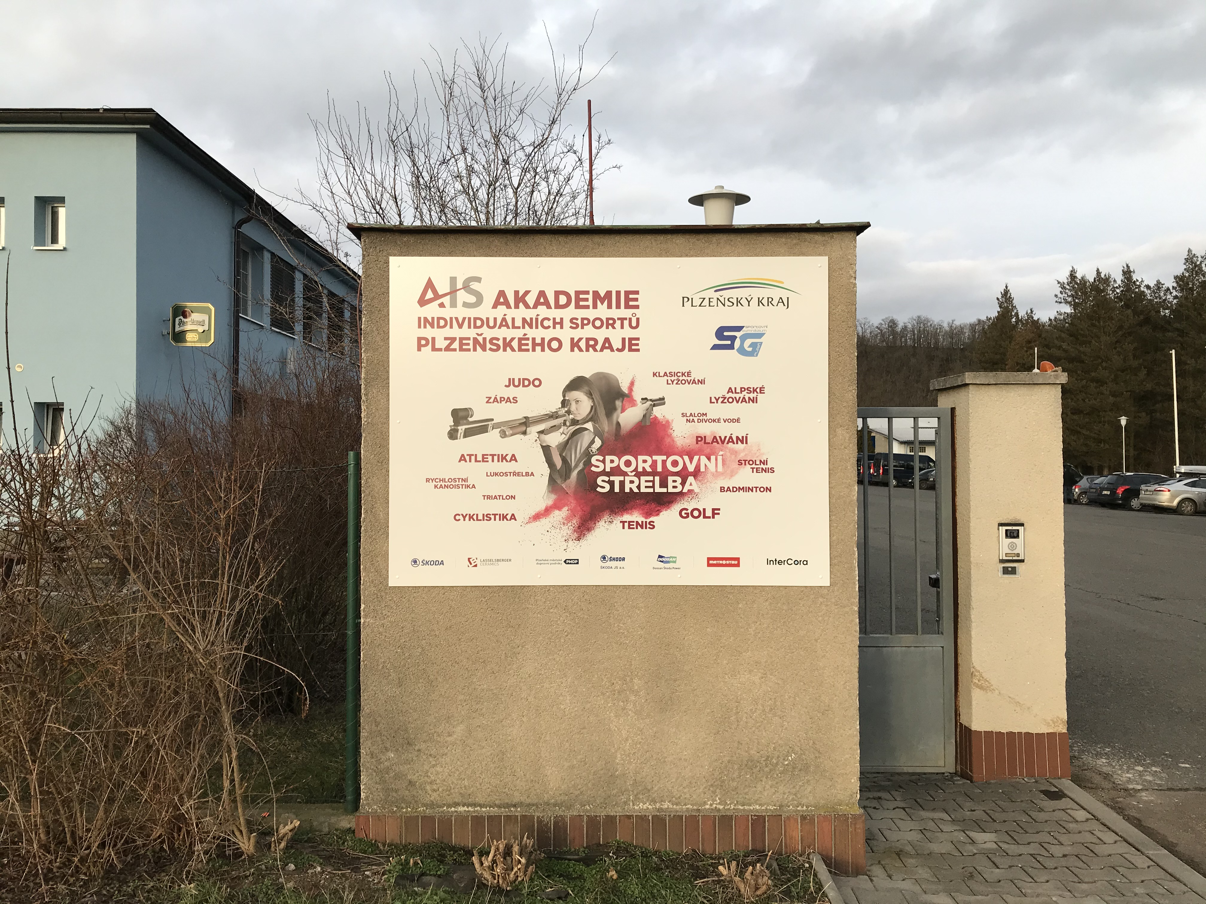 Plocha na vrátnici ASS Dukla Plzeň ukazující, že sportovní střelba je jedním z sportů podporovaných Akademií individuálních sportů Plzeňského kraje